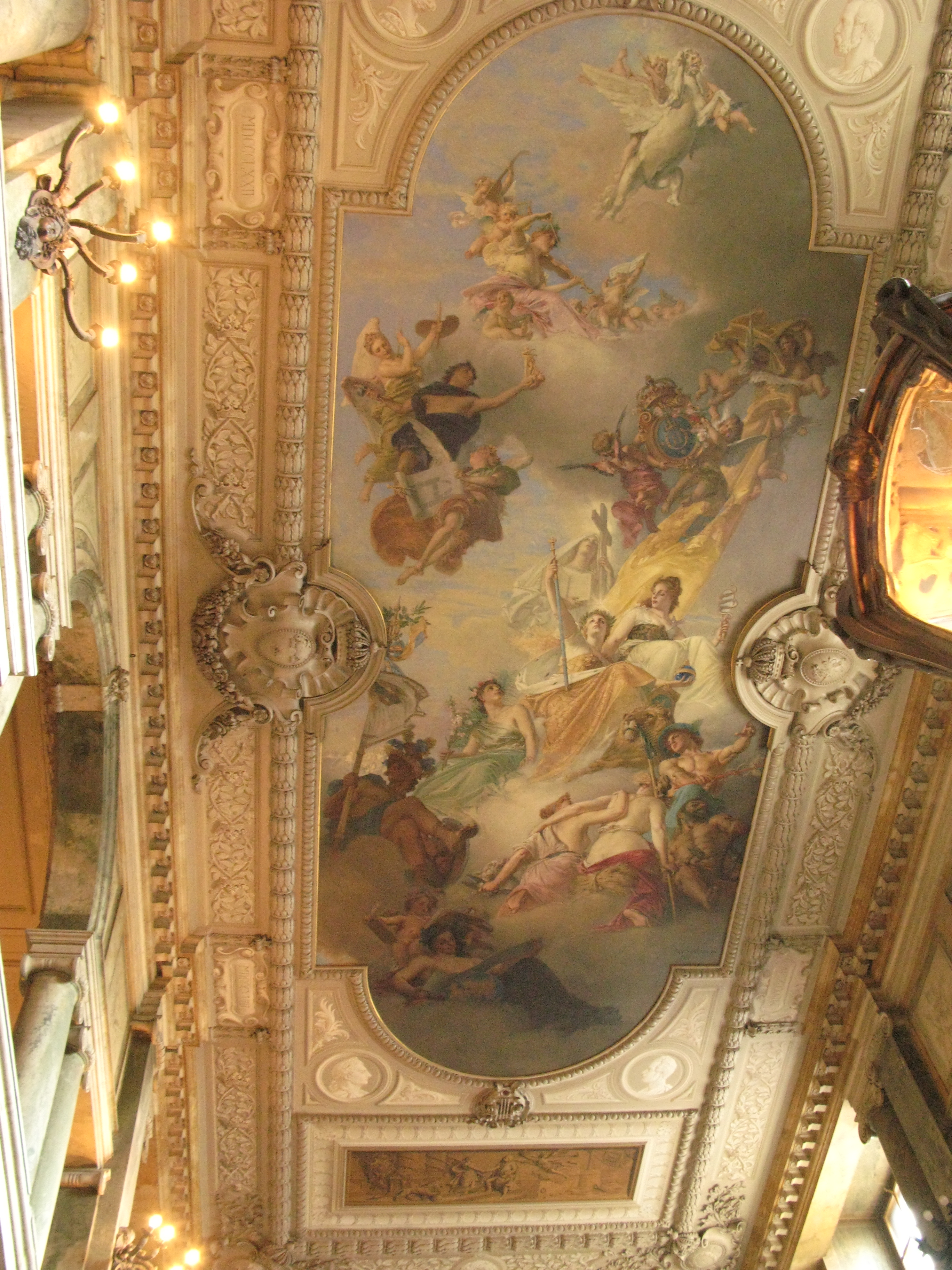 Stockholms slott: Västra trapphallen (trapphuset, kungens trappa), med takmålning av Julius Kronberg 1890-1894. Med utgångspunkt i interiörens Tessinska barock höll han den första målningen strängt i den av lokalen givna stilen, framställde Svea tronande bland molnen med spiran i sin hand och svenska flaggan som bakgrund och omgiven av symboliska figurer: Religion, Fred, Vetenskap, Industri m. [1]